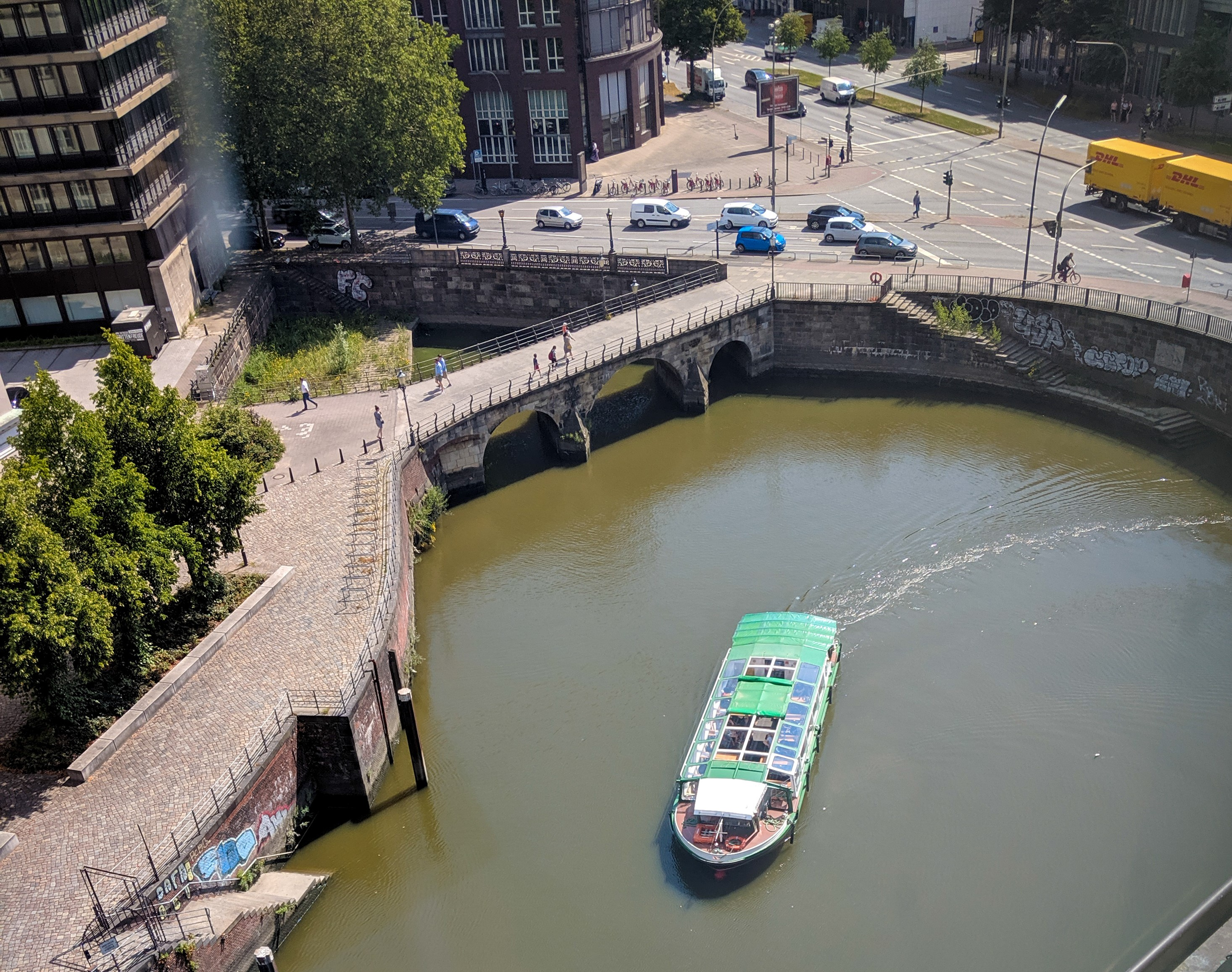 Zollenbrücke im Nikolaifleet 2019